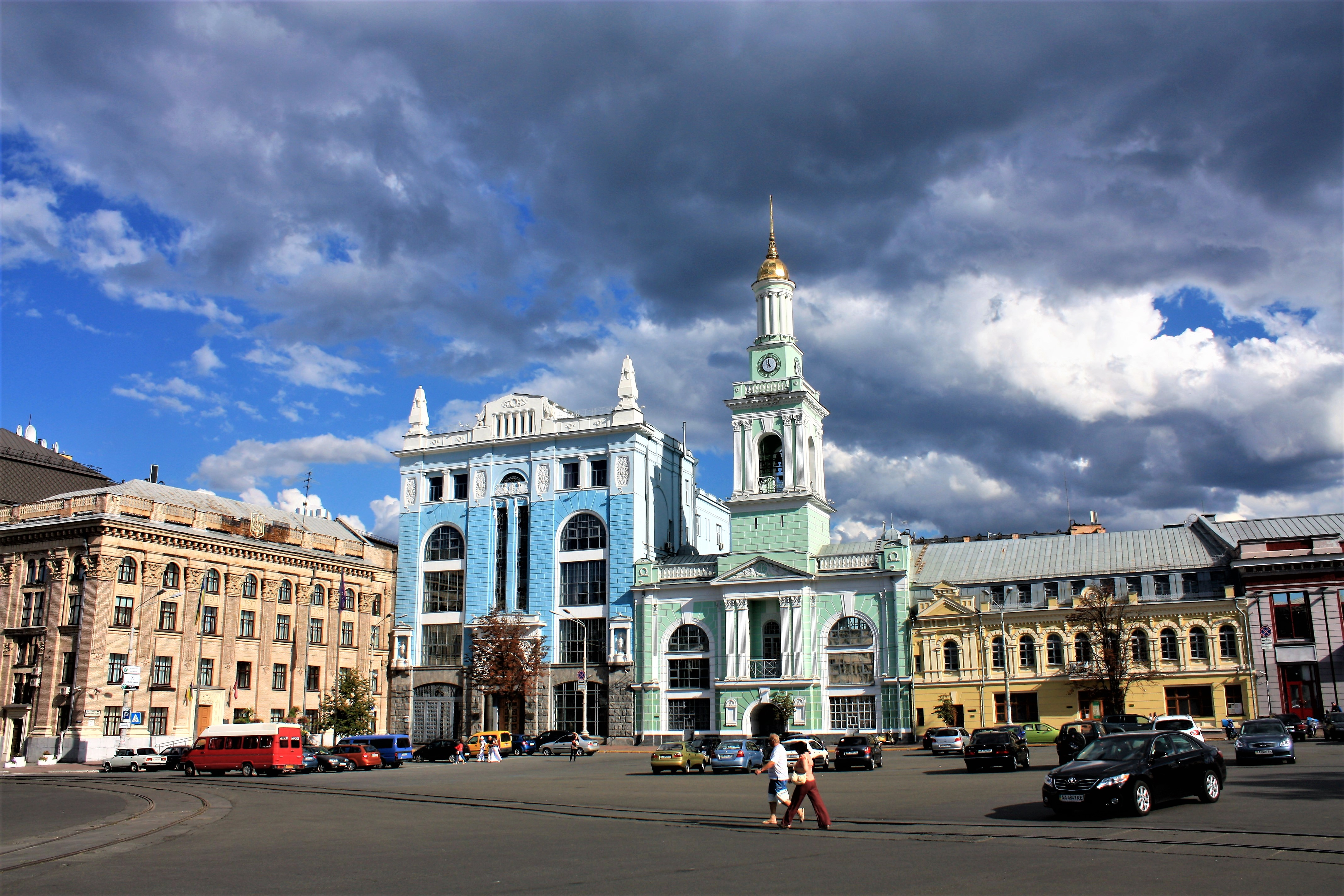 Київ, Контрактова площа, 2. Комплекс Греко-Синайського Свято-Катерининського монастиря.